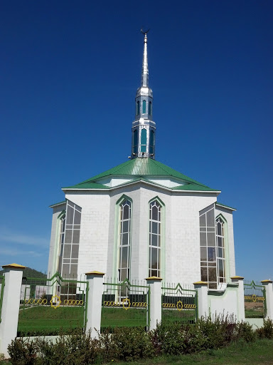 Соборная мечеть Октябрьский.